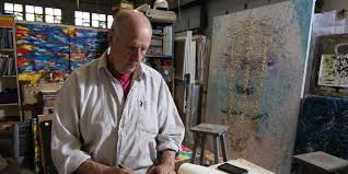 Pintor